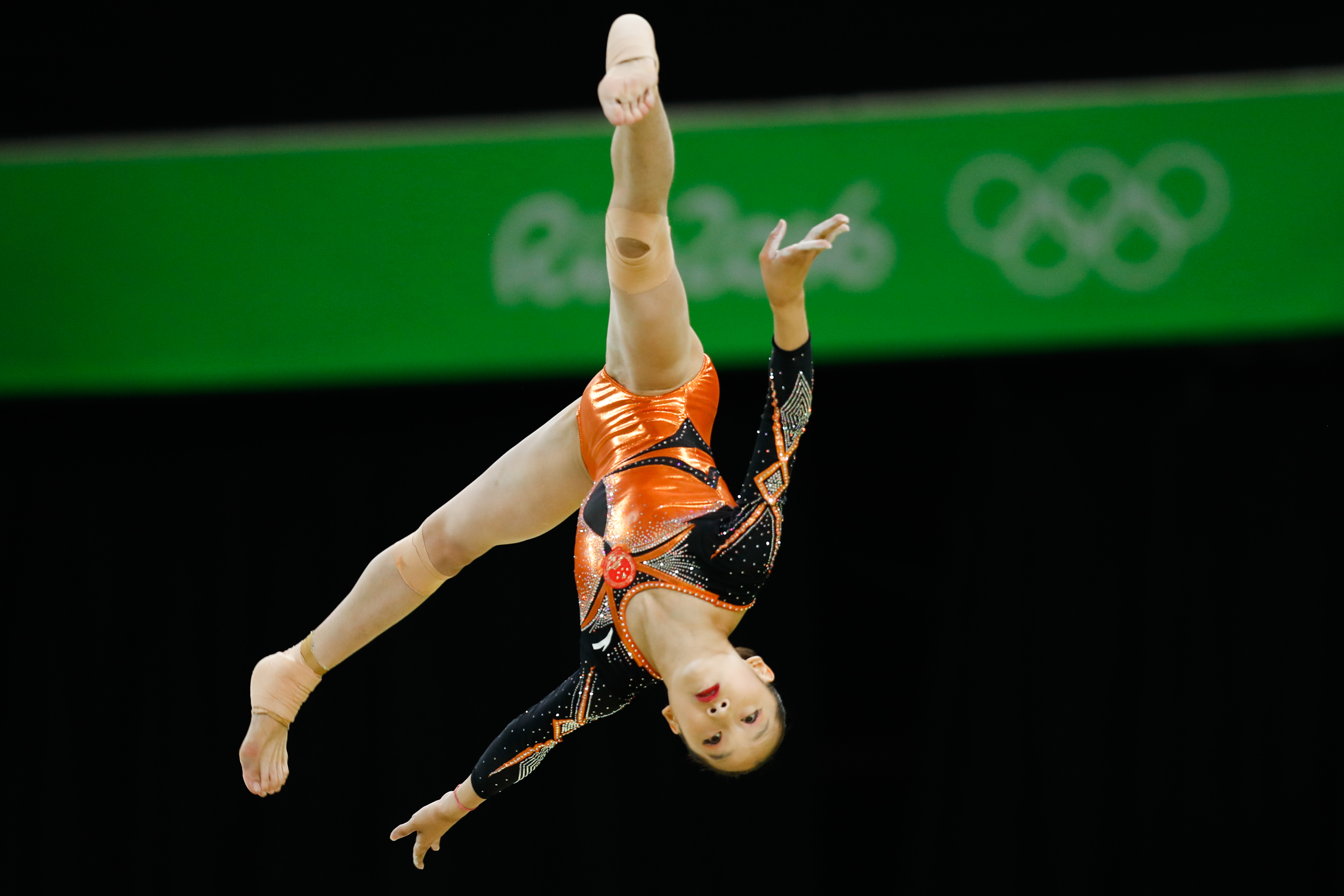 Rio de Janeiro - Ginasta da China Yilin Fan termina final por aparelhos da trave na 6ª colocação (Fernando Frazão/Agência Brasil)